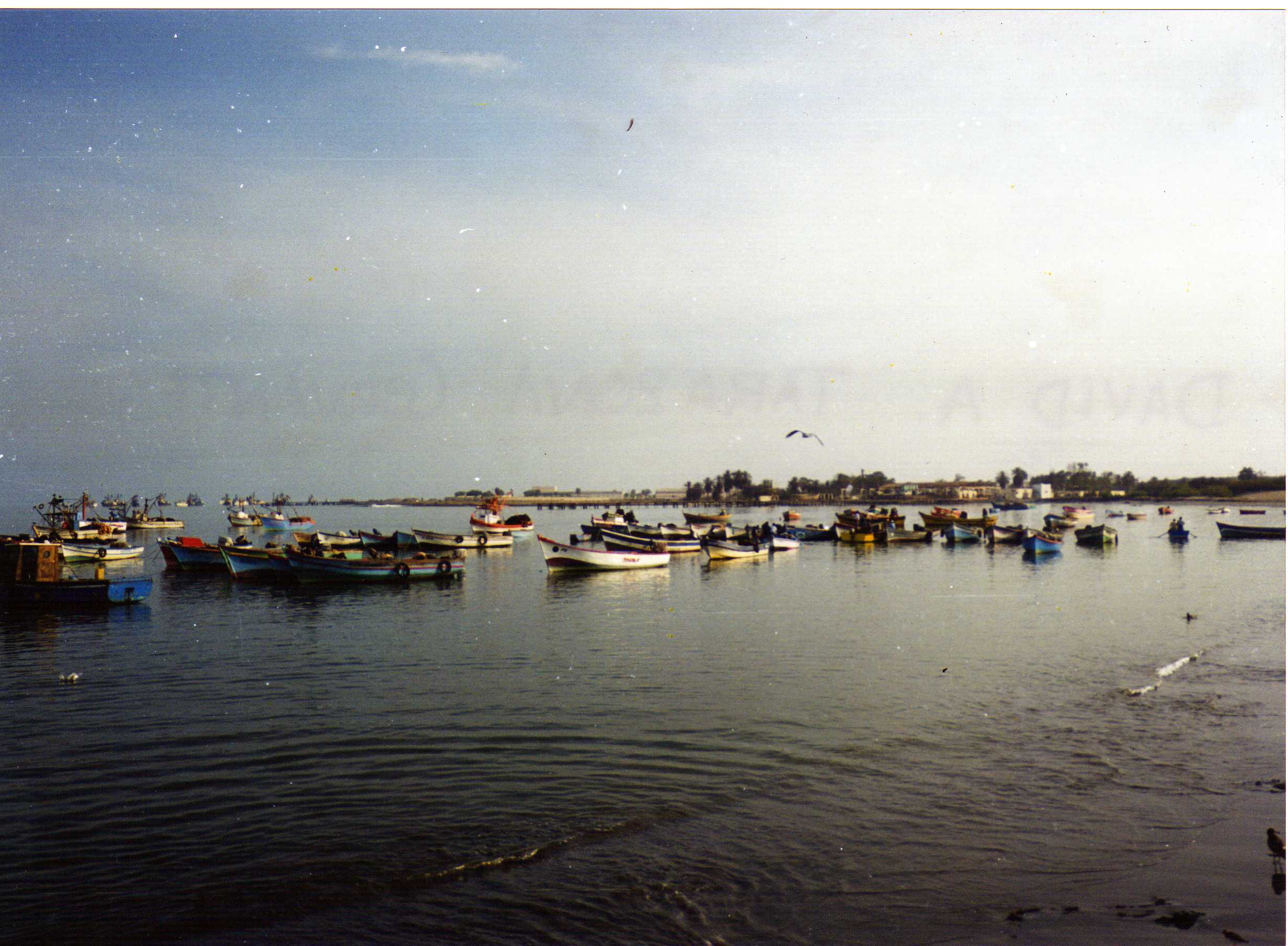 Playa de Pisco en horas de la mañana.